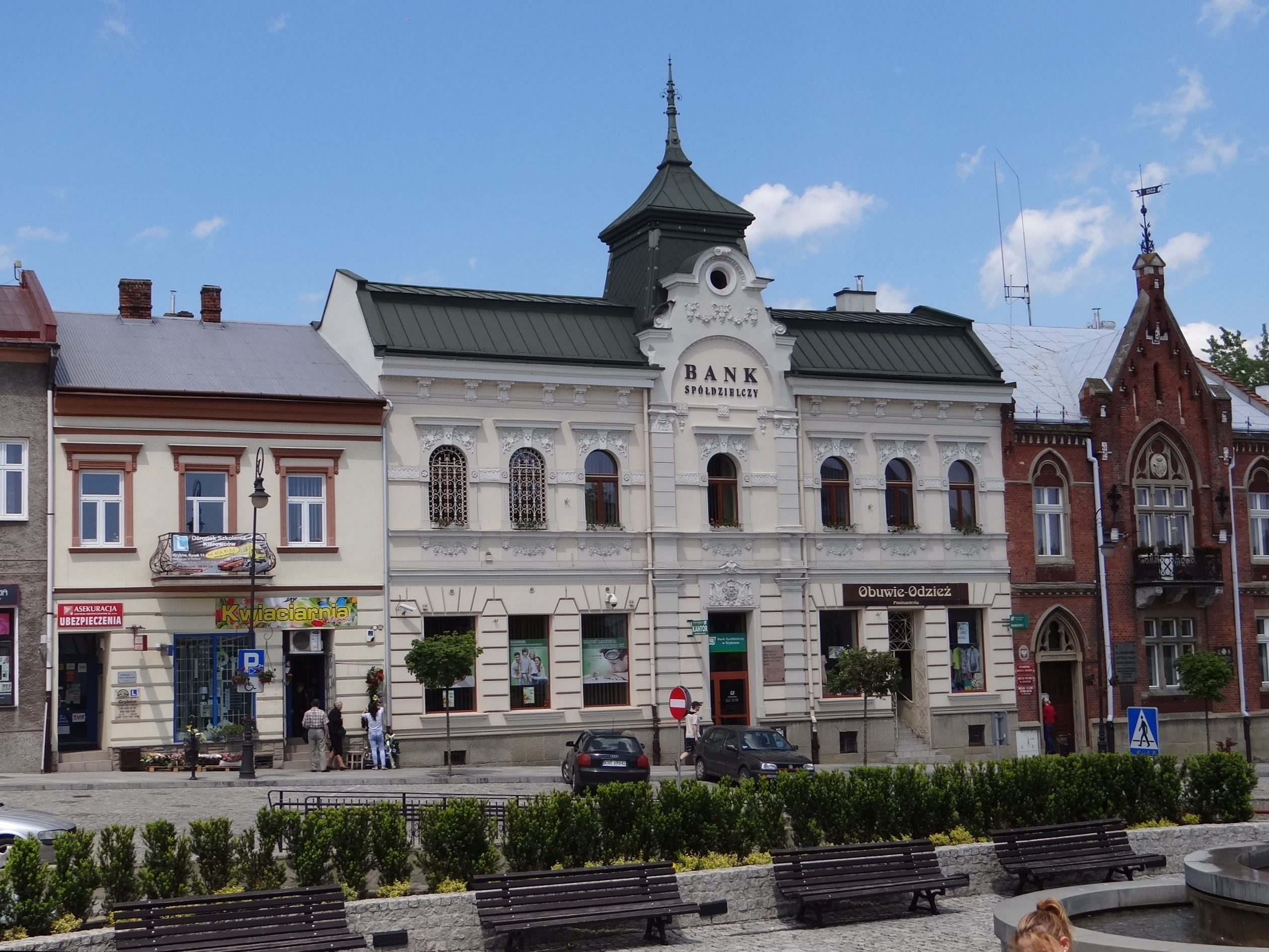 Centrum Grybowa